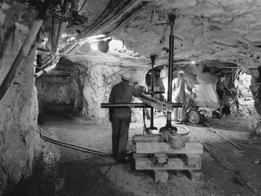 Atlas Copco: Provgruvan 20 meter under jord i Sickla Industriområde.